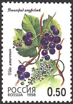 Почтовая марка России